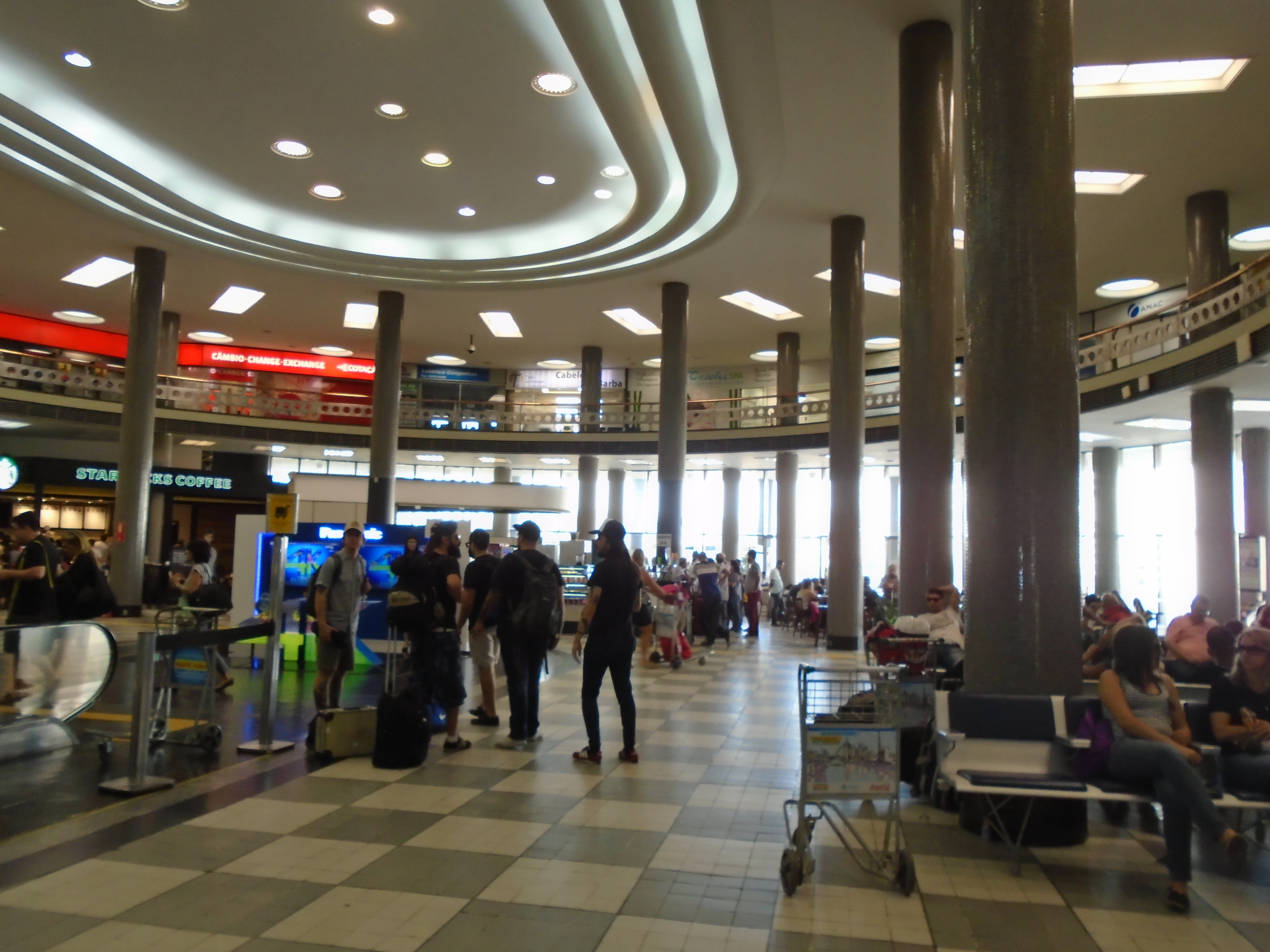 Aeroporto Internacional de Congonhas - 2016-01-31